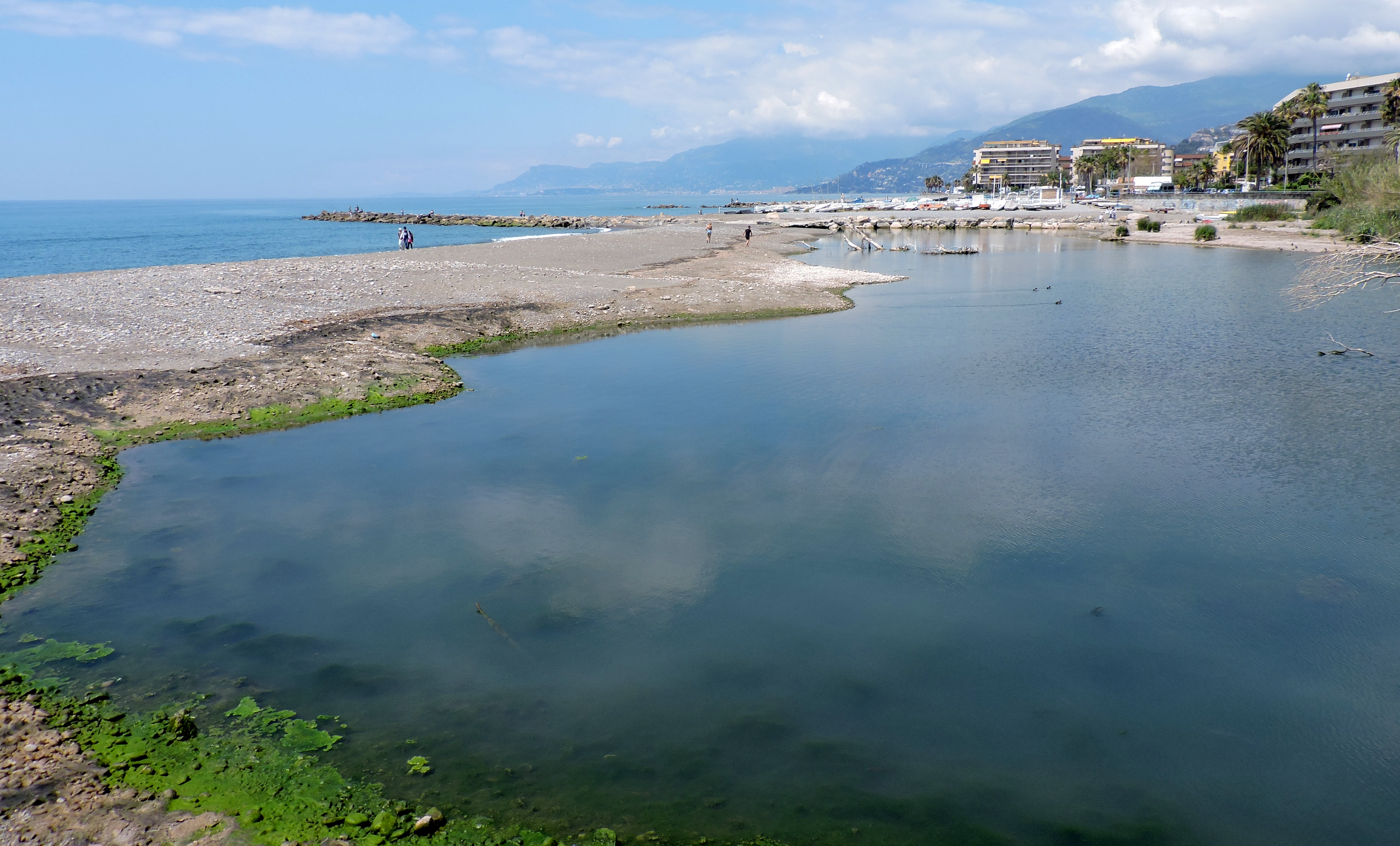 Torrente Nervia (Q49961367)